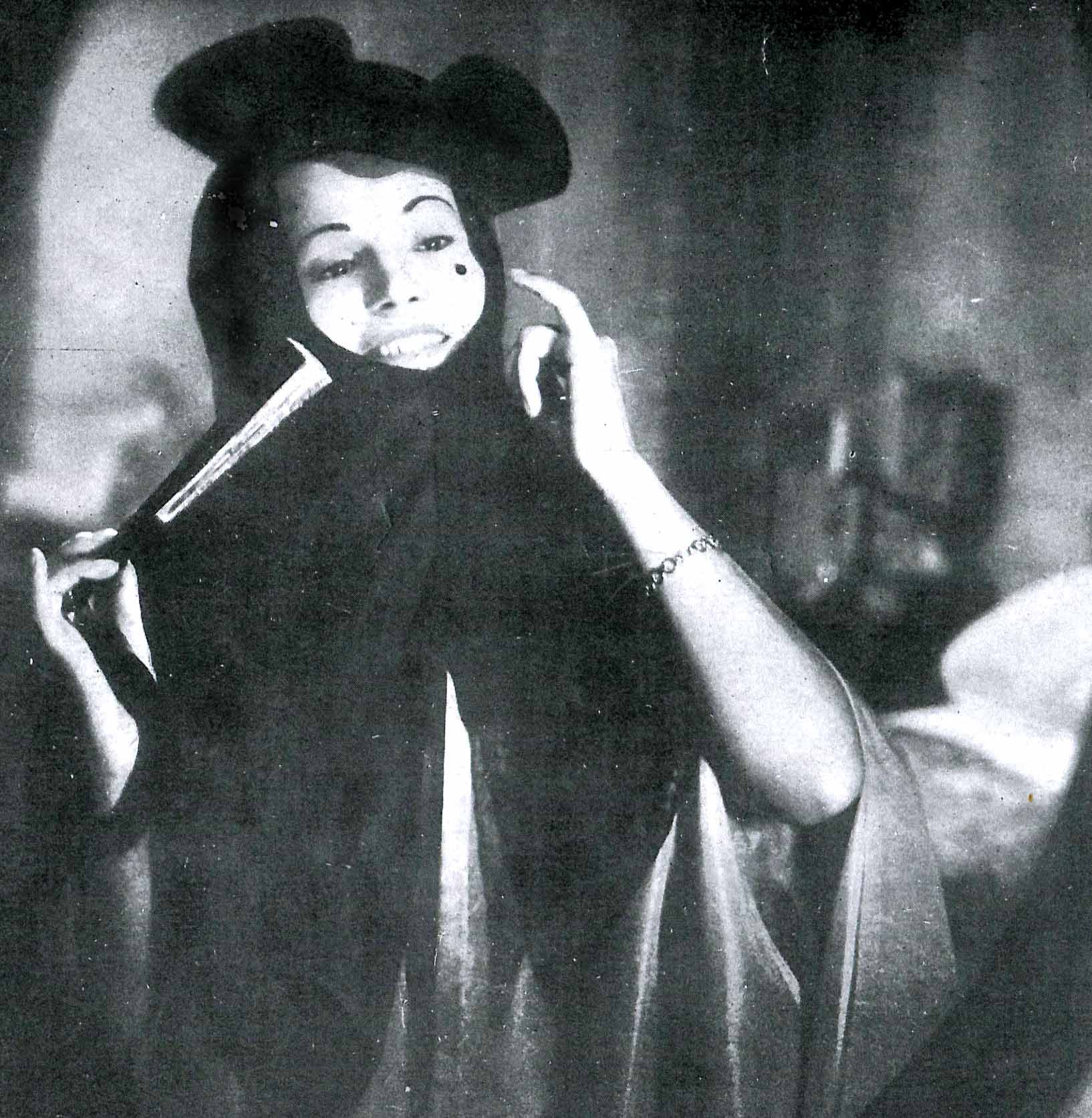 Luisa Ferida ne "La locandiera" (Chiarini, 1944)